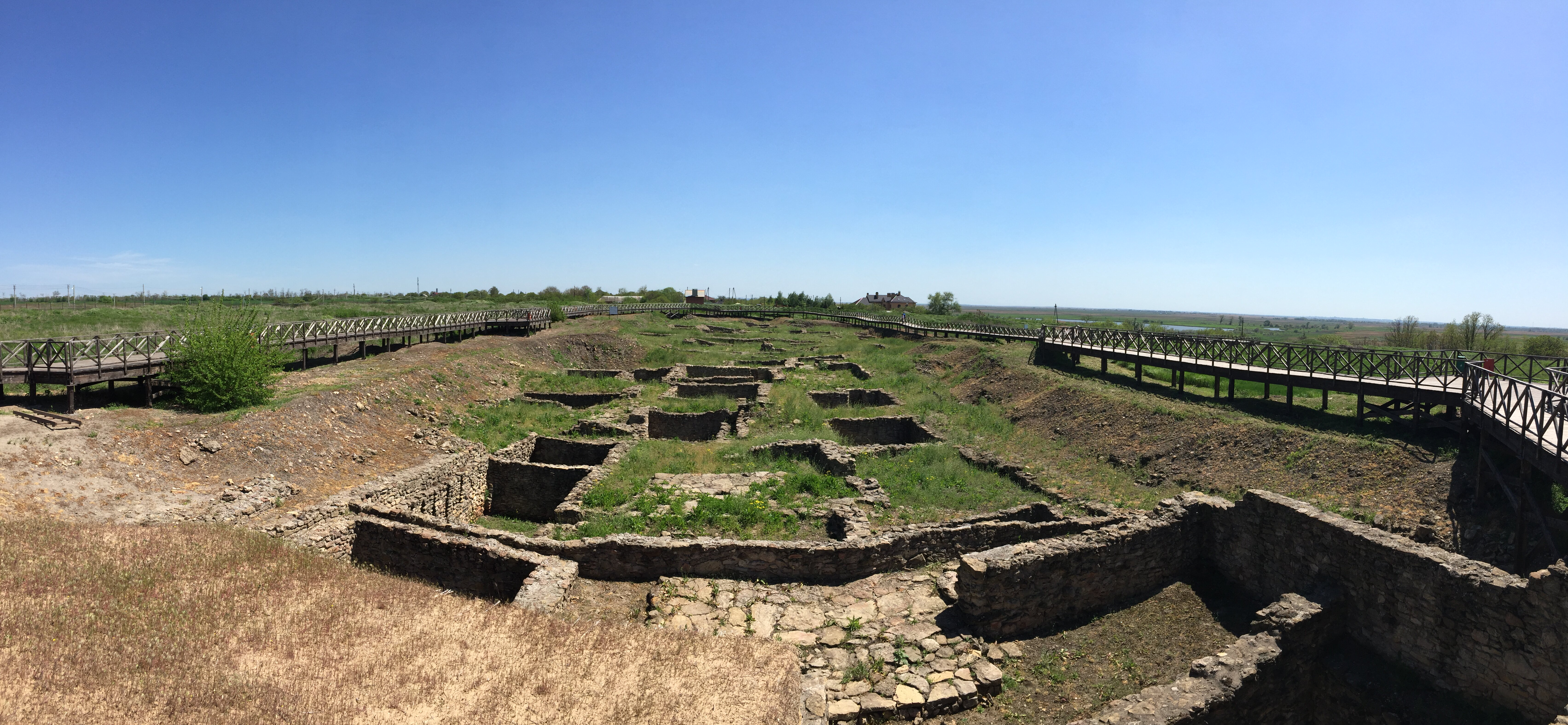 Танаис, археологический музей-заповедник: Недвиговка, Мясниковский район, Ростовская область This image is related to the protected area of Russia number 6100081